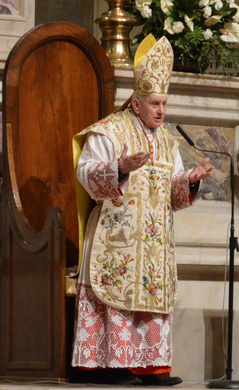 Il cardinal Ernest Simoni durante una Celebrazione eucaristica da lui presieduta nel duomo di Firenze.